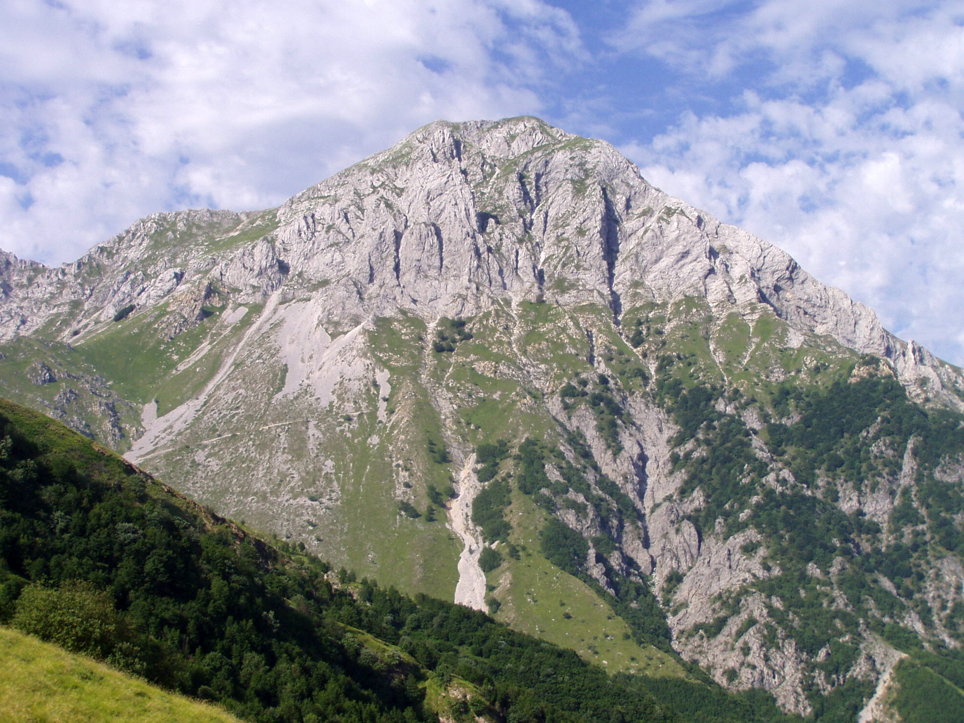 Pania della Croce from south-west